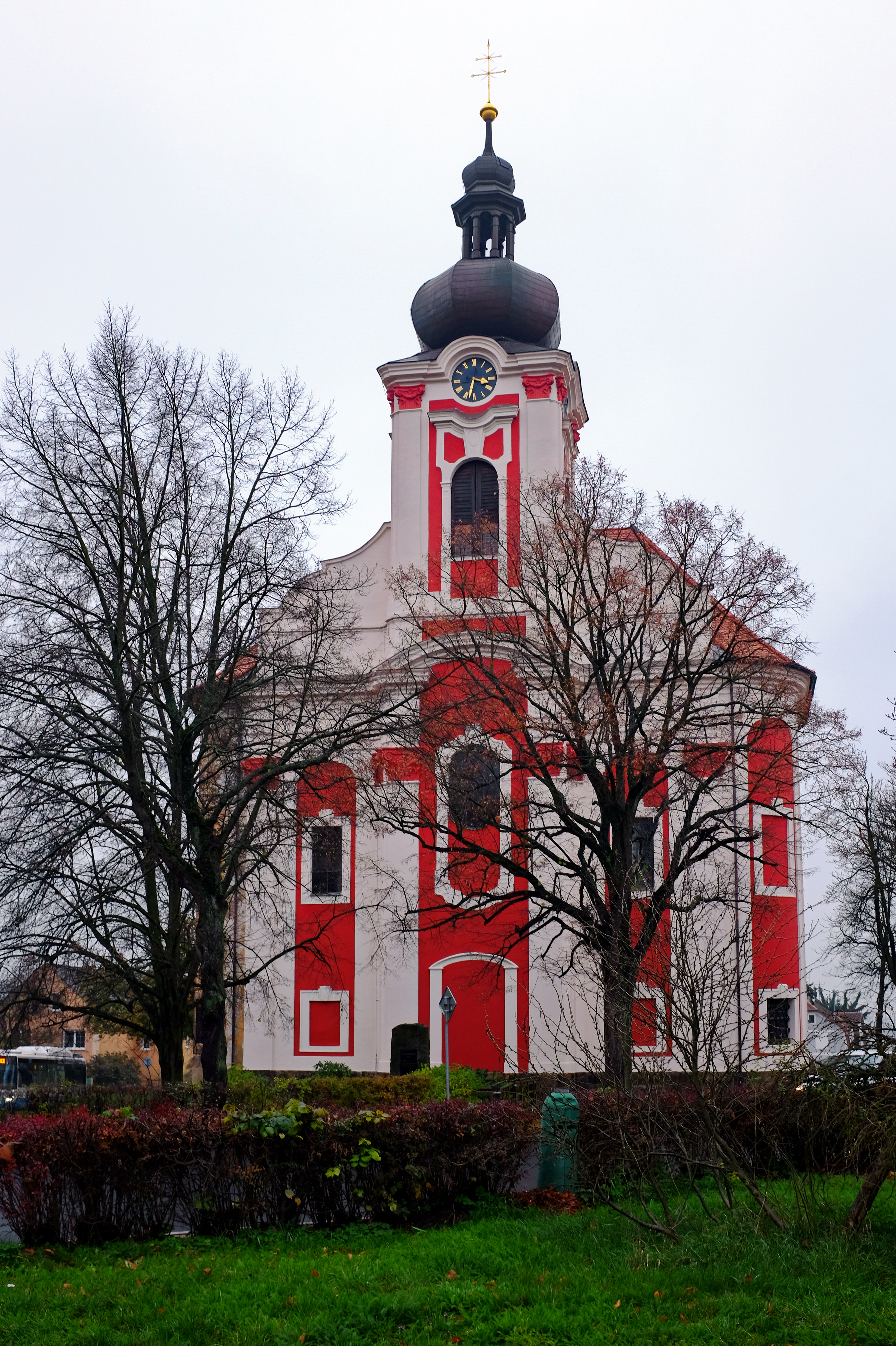 Kostel svaté Anny, st. 21, pp. 57, Sedlec (Karlovy Vary).